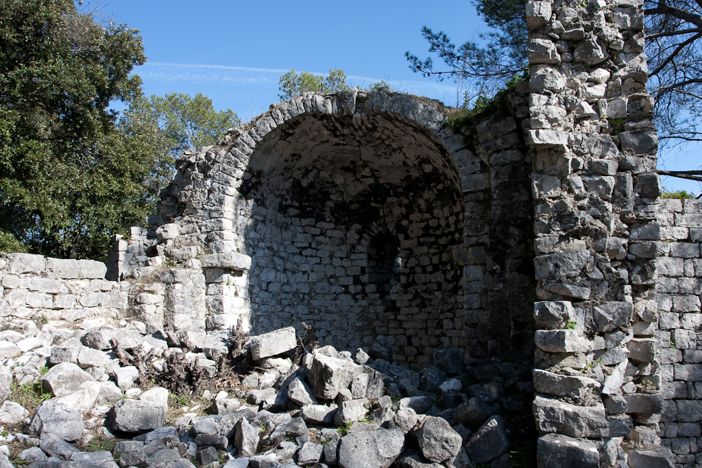 Ruines du Chateau de Roquefort vers Roquefort-les-Pins. Ici les restes d'une église.